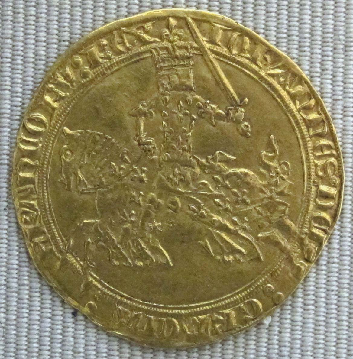 Valois, giovanni II il buono, franco col cavallo, 1350-1364